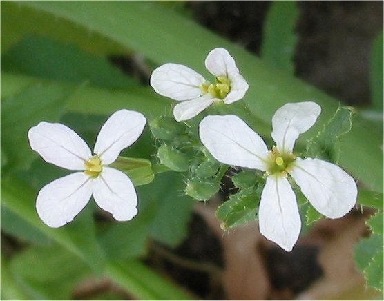 Raphanus sativus subsp. sativus